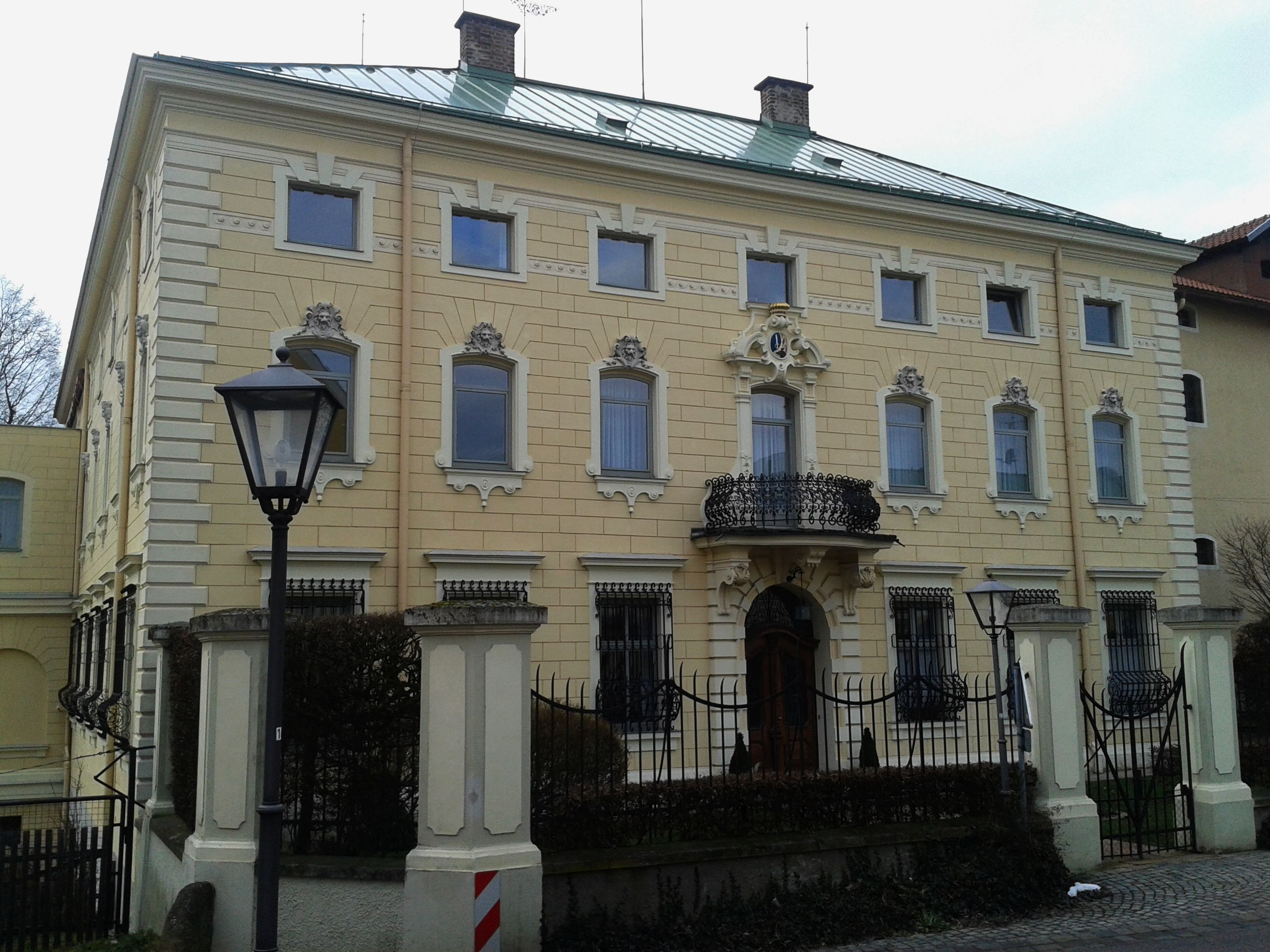 Schoss Leonberg (Leonberg)